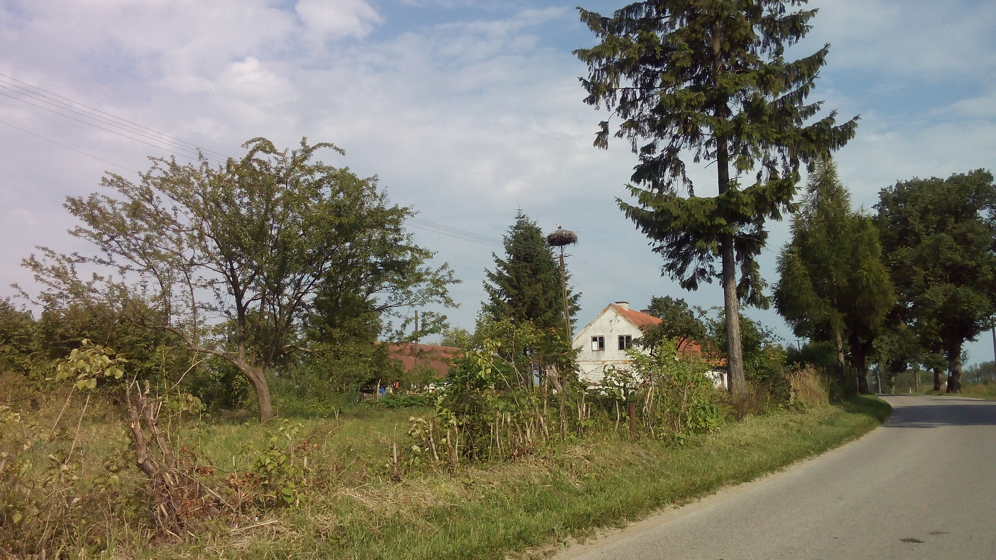 Gniazdo bociana białego znajdujące się we wsi Czyprki